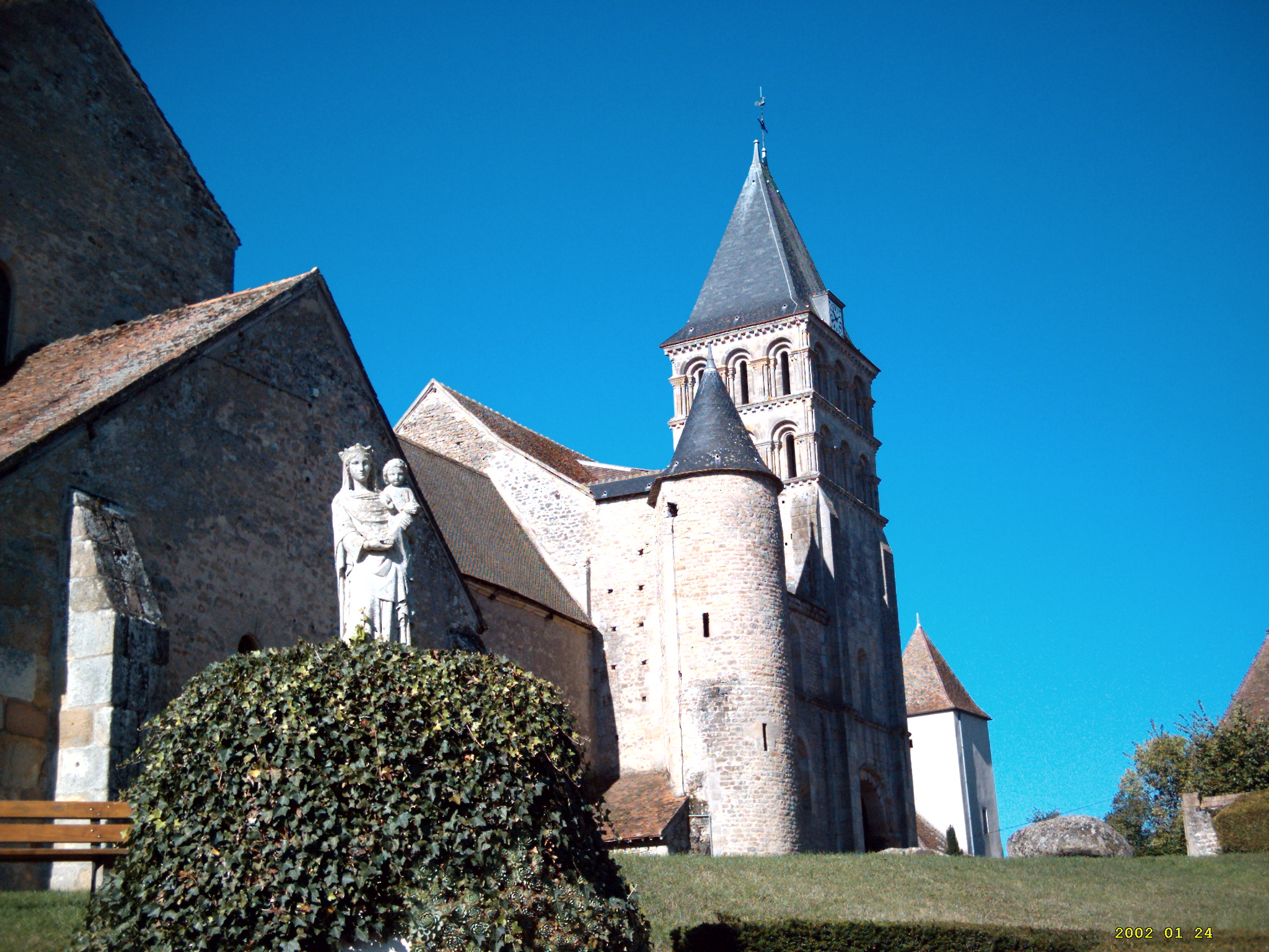 Le Prieuré de Perrecy-les-Forges. L'église actuelle a été construite entre 1020 et 1030. Malgré les mutilations subies au cours des siècles, l'église est un bon résumé de l'art roman en Saône-et-Loire.